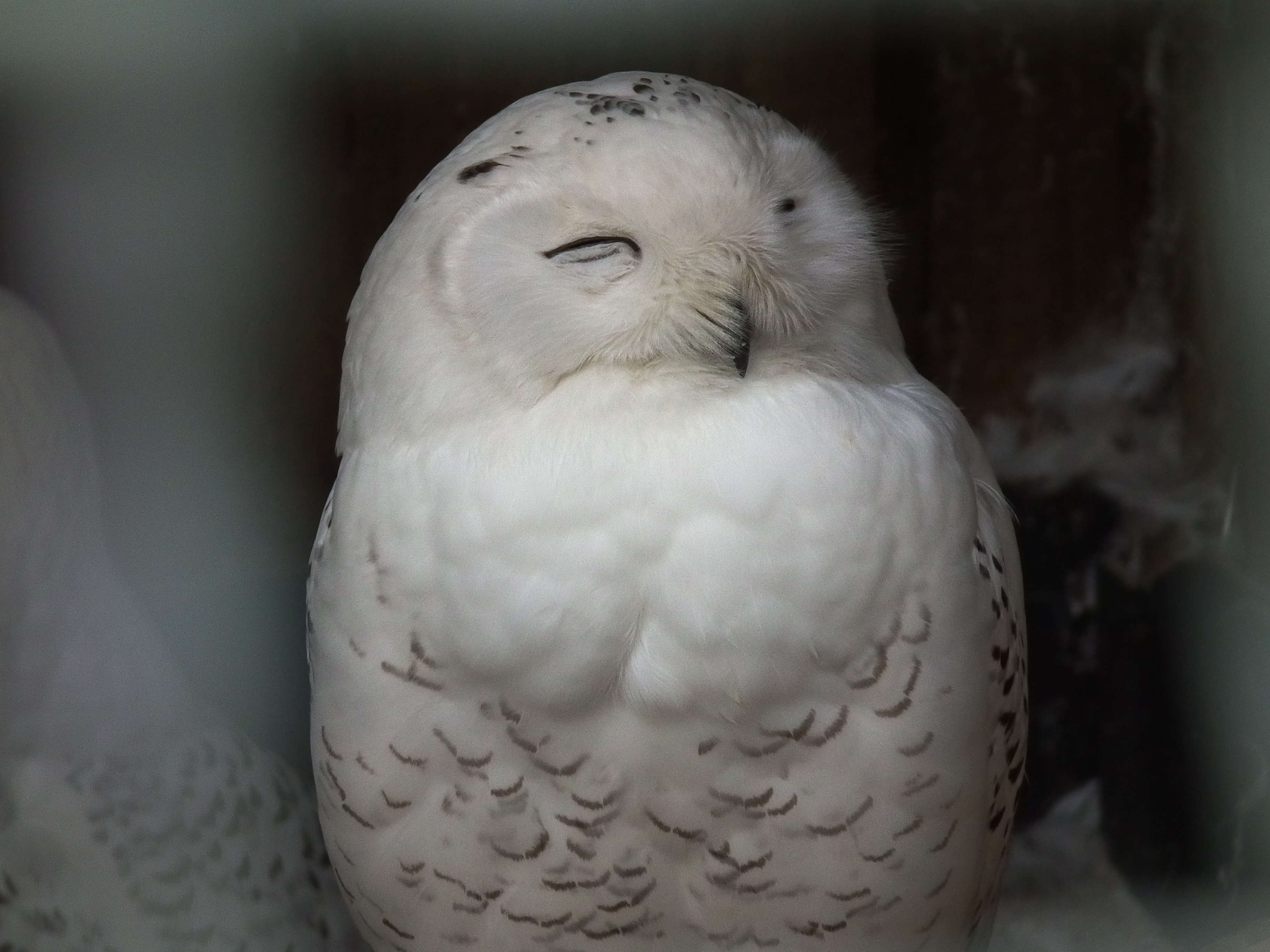 Schläfrige Schneeeule (Bubo scandiacus) im Vogelpark Zuzenhausen (Baden-Württemberg, Deutschland)